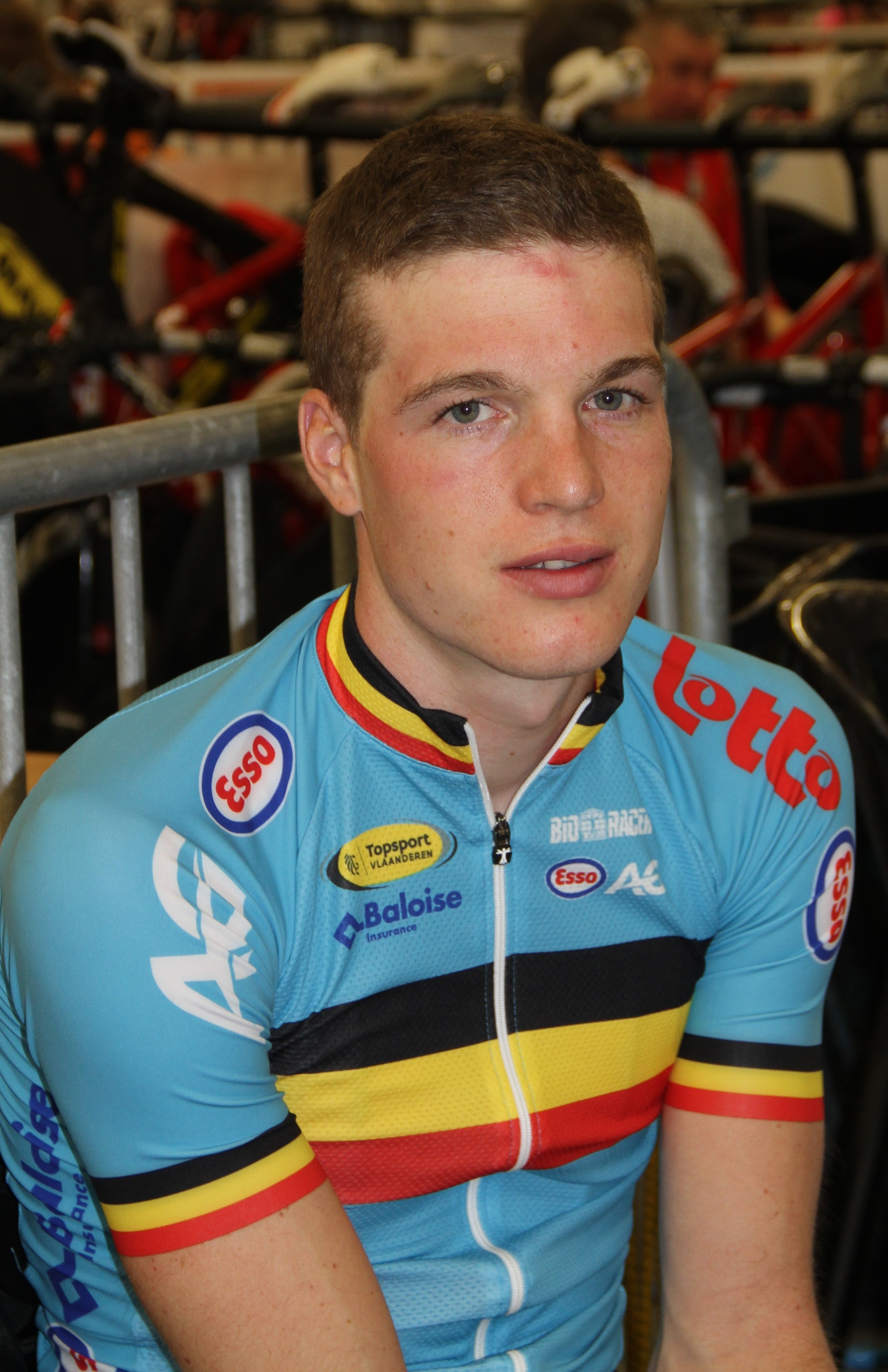 Gijs Van Hoecke, belgischer Radsportler The making of this document was supported by the Community-Budget of Wikimedia Germany.